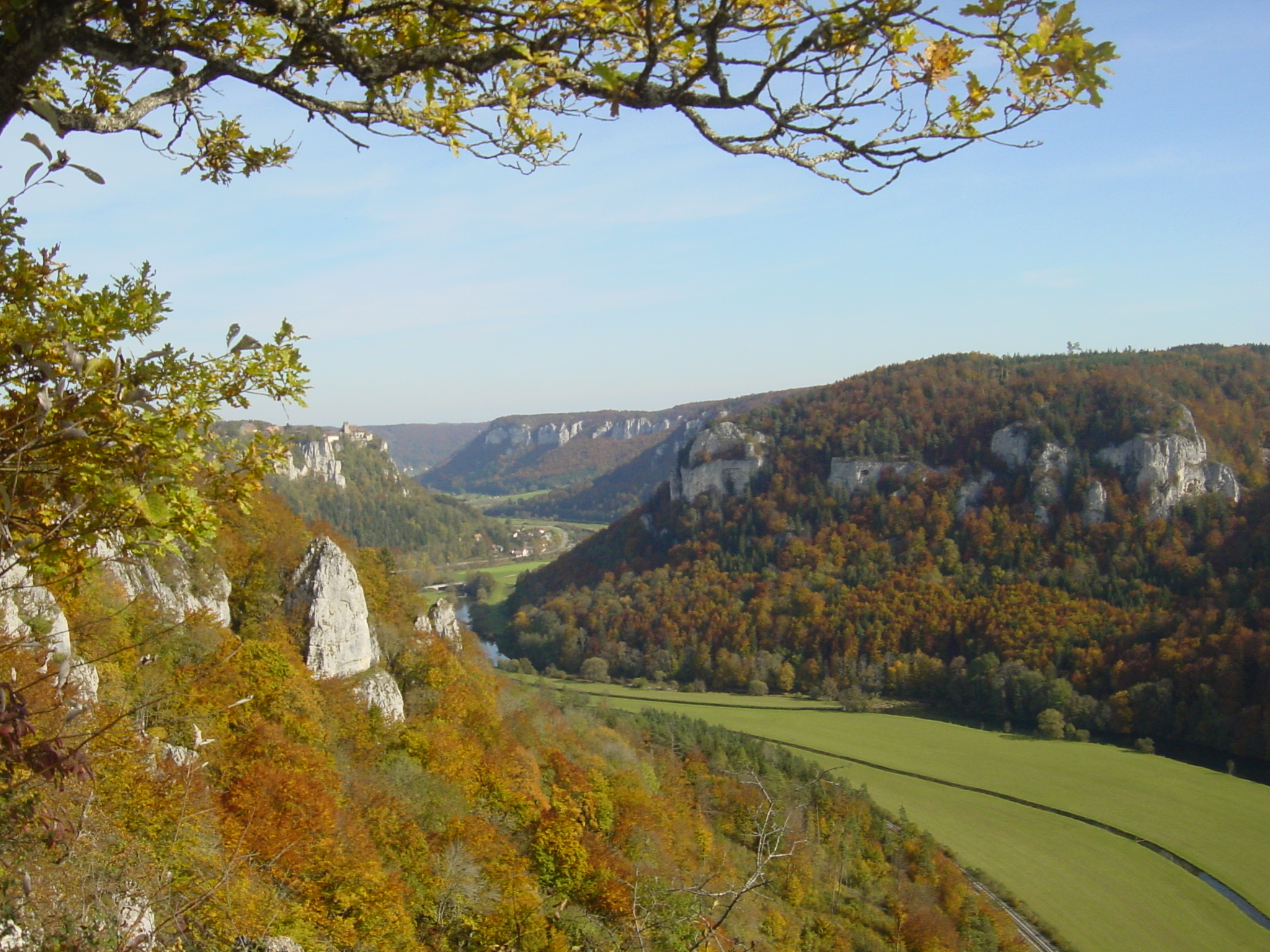 Blick vom Eichfelsen ins herbstliche Obere Donautal. Die Ortschaft, die im Tal zu erkennen ist, ist Langenbrunn (Ortsteil von Hausen im Tal) Gemeinde Beuron. Oberhalb von Langenbrunn ist das Schloß Werenwag zu erkennen.